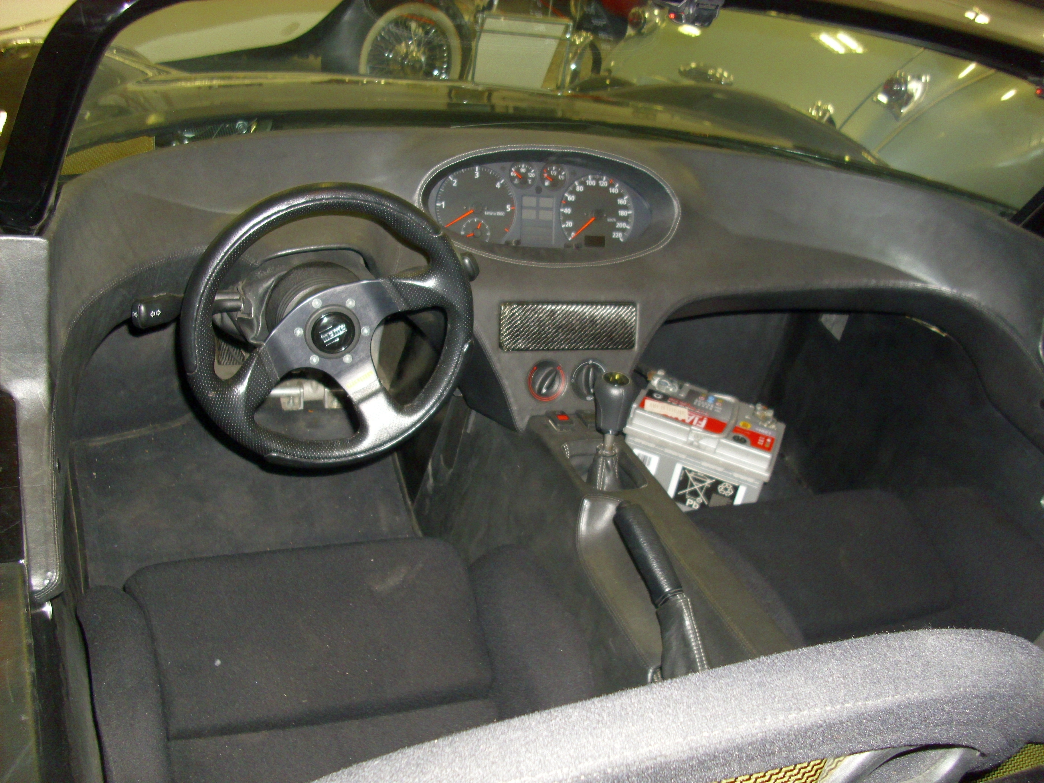 Zato 2006 Interieur